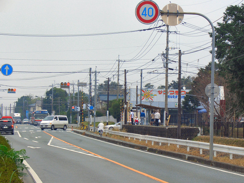 熊本電気鉄道再春荘前駅 奥が御代志駅方面、手前が北熊本駅方面。 撮影者/著者/著作権保有者 : MK Products (本人がアップロード) 撮影日 : 2006/09/24 再春荘前駅用にアップロードした画像です。良い画像があれば別の画像に変えてください。